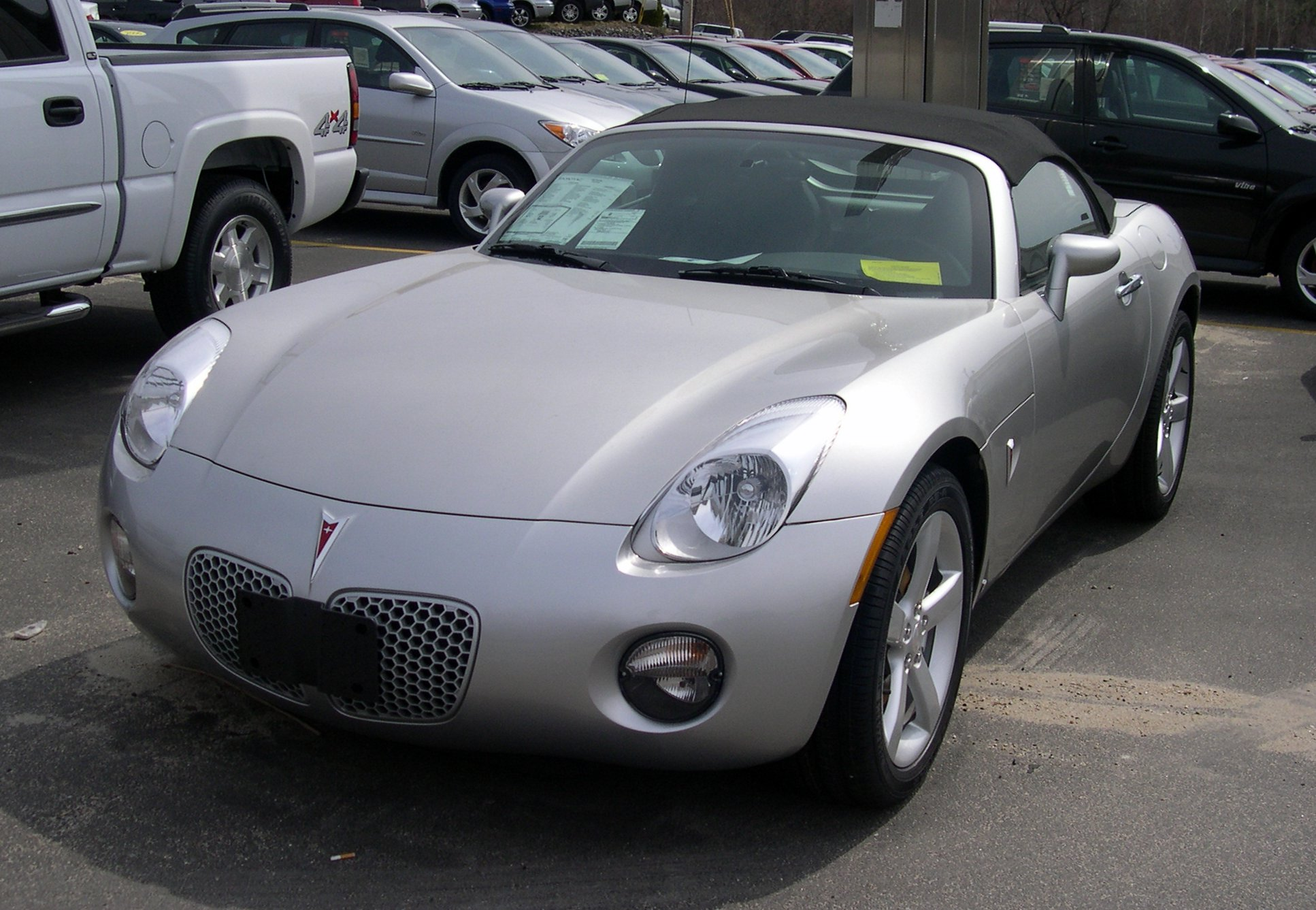 2006 Pontiac Solstice